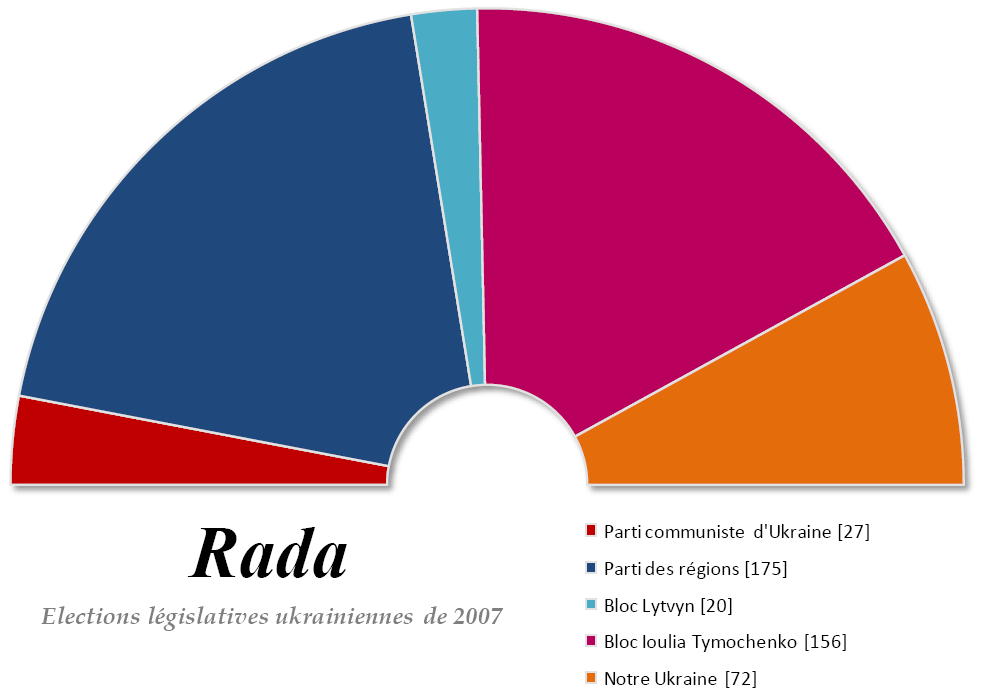 Composition du Parlement ukrainien après les législatives du 30 sept. 2007